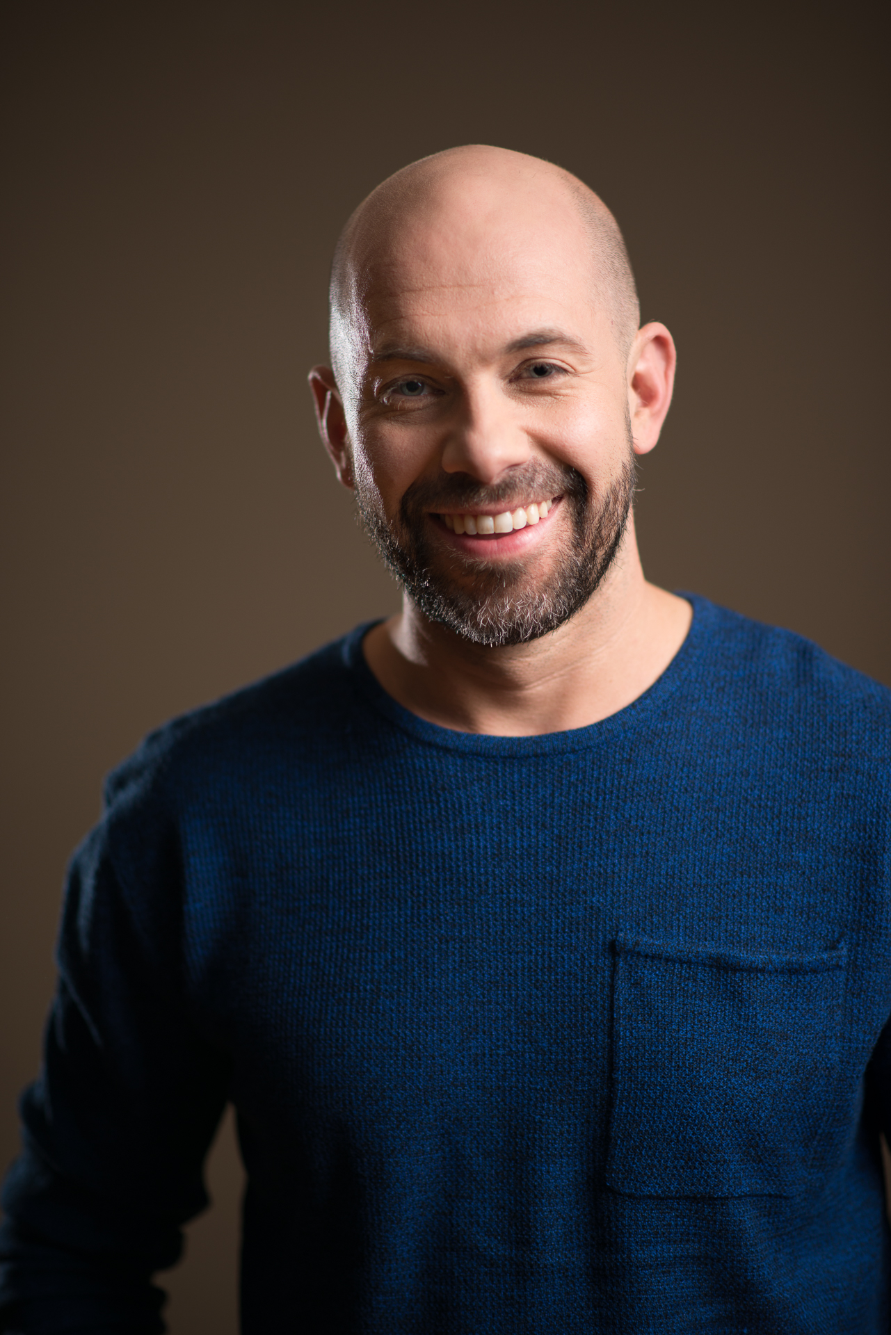 André Roy - comédien, auteur, réalisateur, producteur